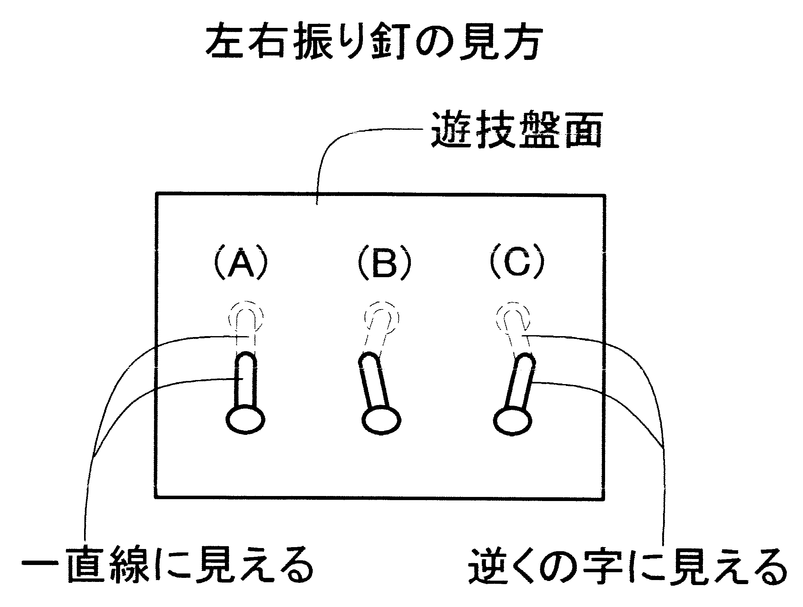 釘植設状況の見方